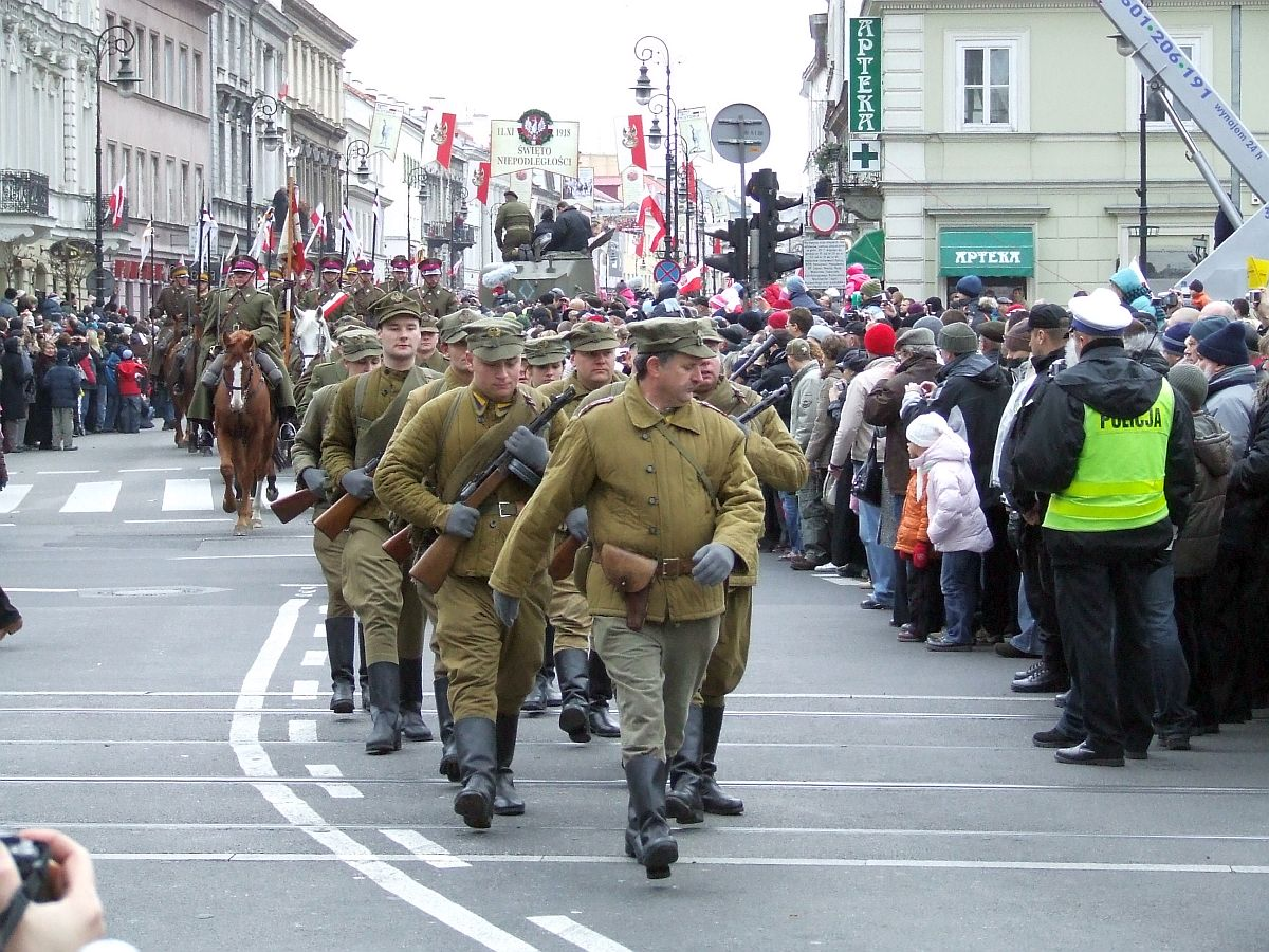 pl:1 Warszawska Dywizja Piechoty im. Tadeusza Kościuszki - reconstruction by "Jarzębina Czerwona" reenacting group (Warsaw)